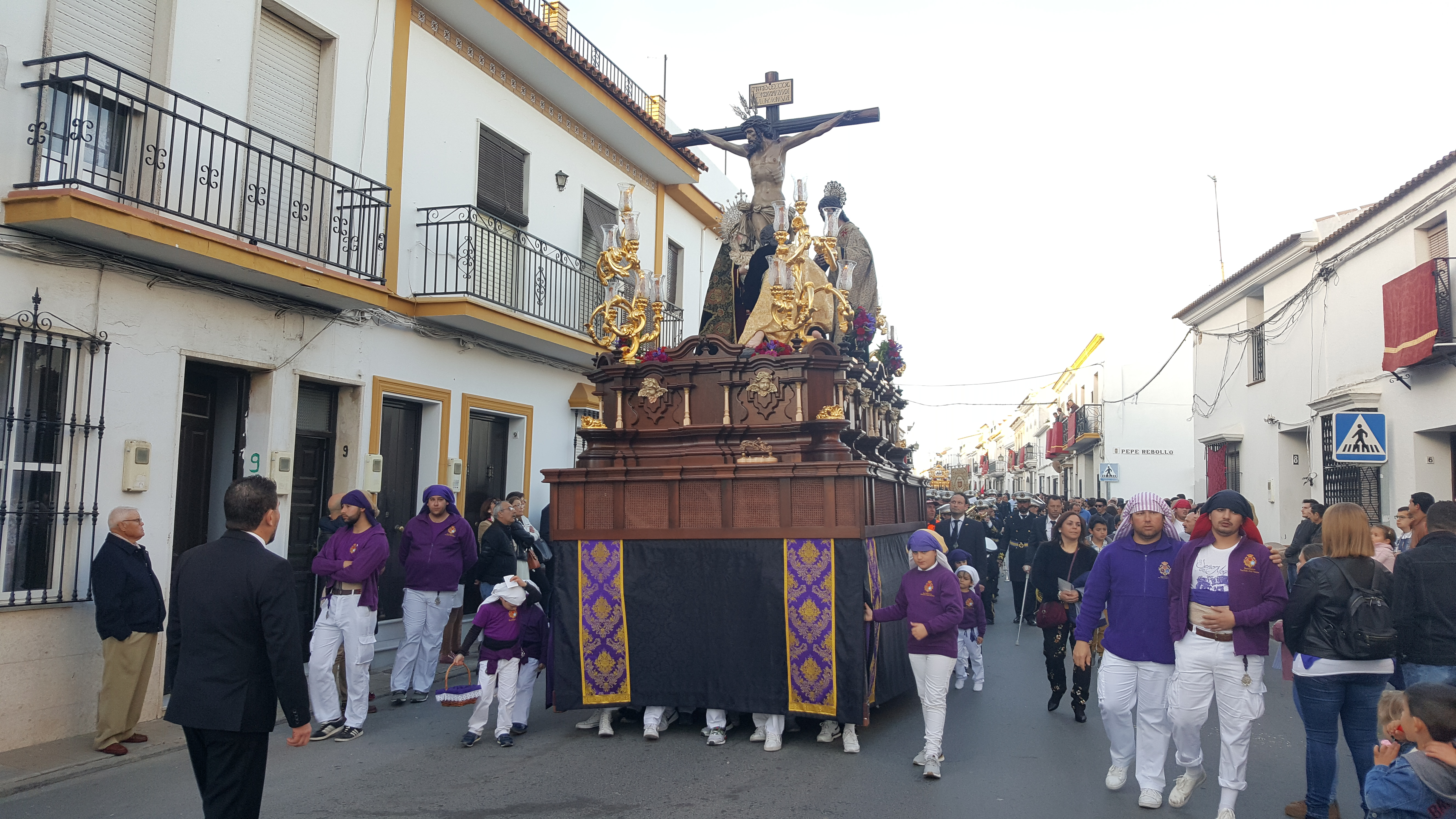 Hermandad del Santo Entierro. Desfile procesional del Sábado Santo. Vista del paso del Cristo de la Misericordia por el casco urbano de Moguer.